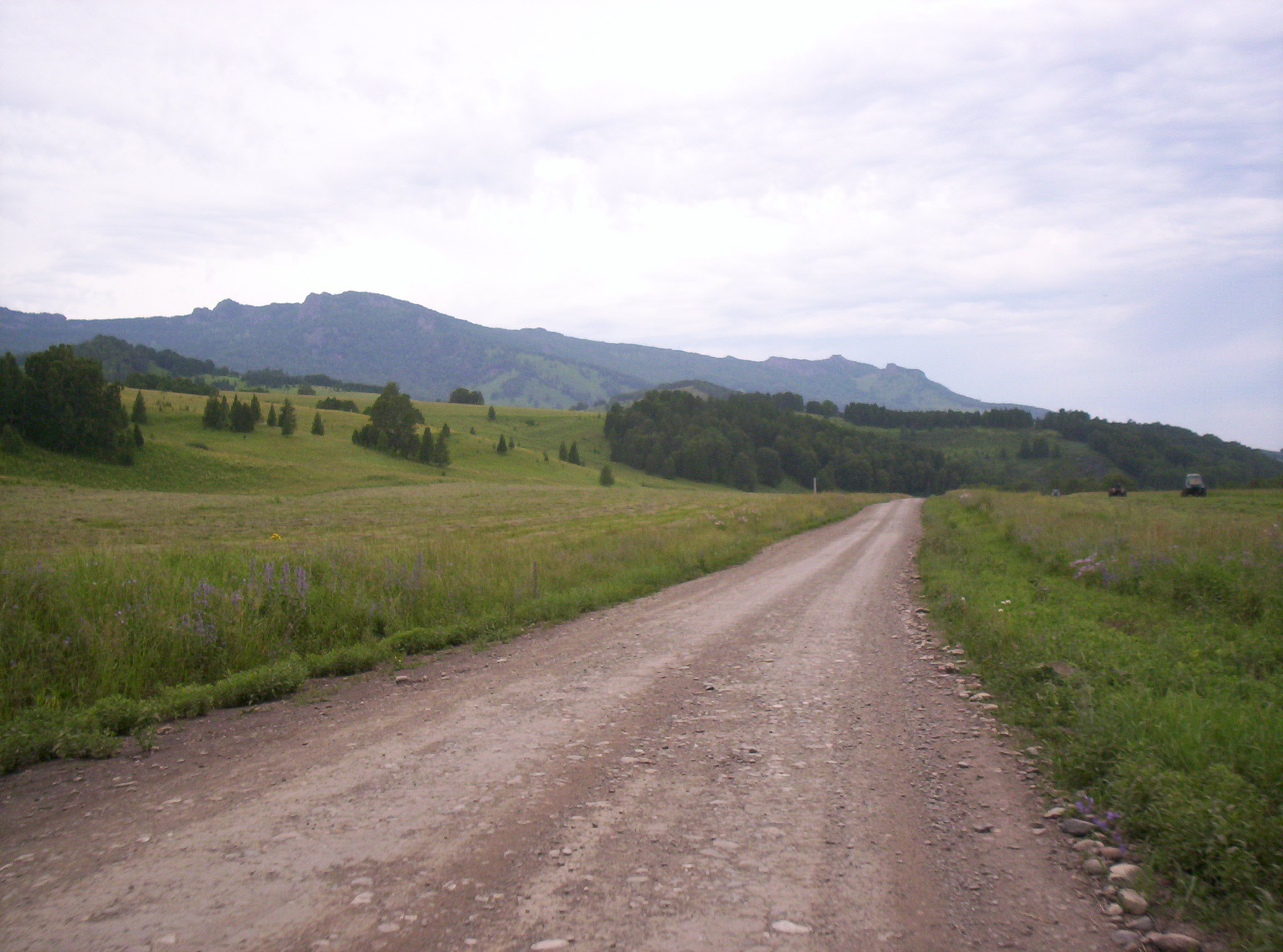 Ануйский хребет